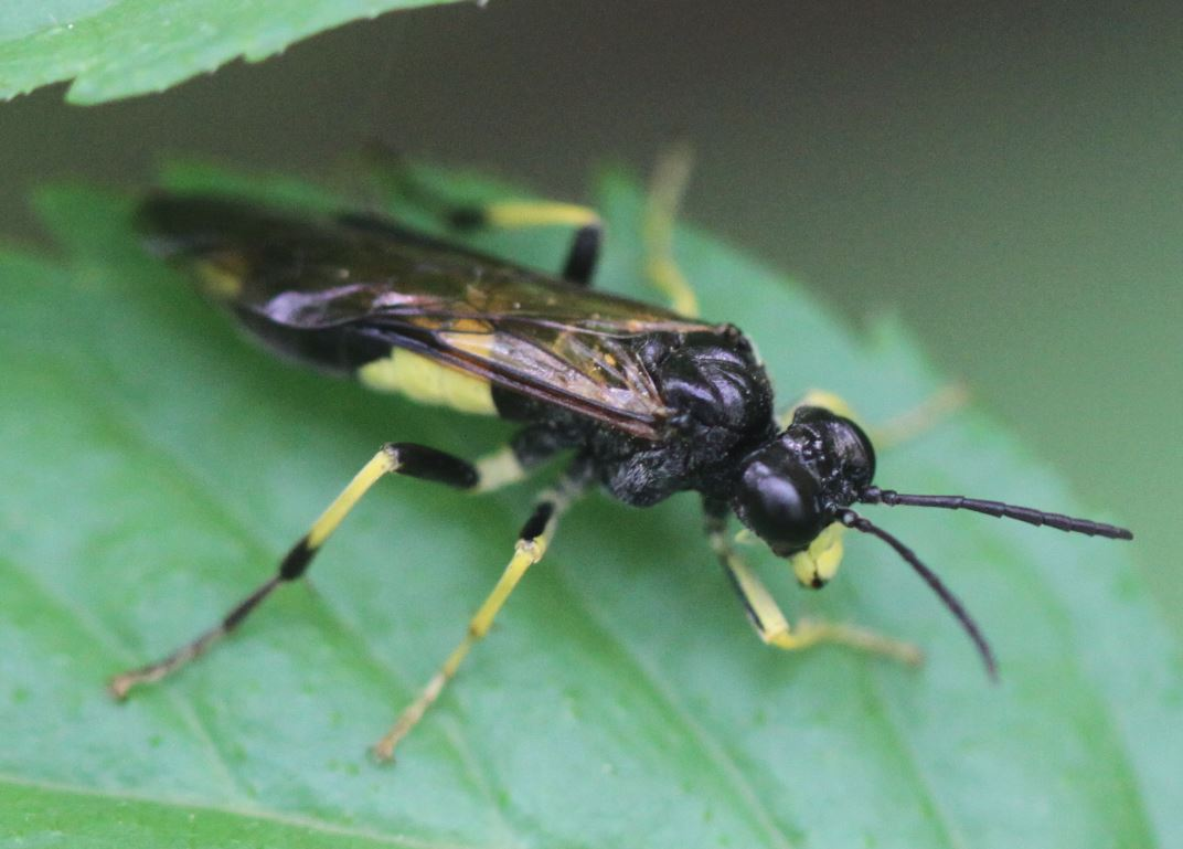 Tenthredo temula, Weibchen, am 10. Mai 2019 in einem Wald nahe Walldorf/Baden